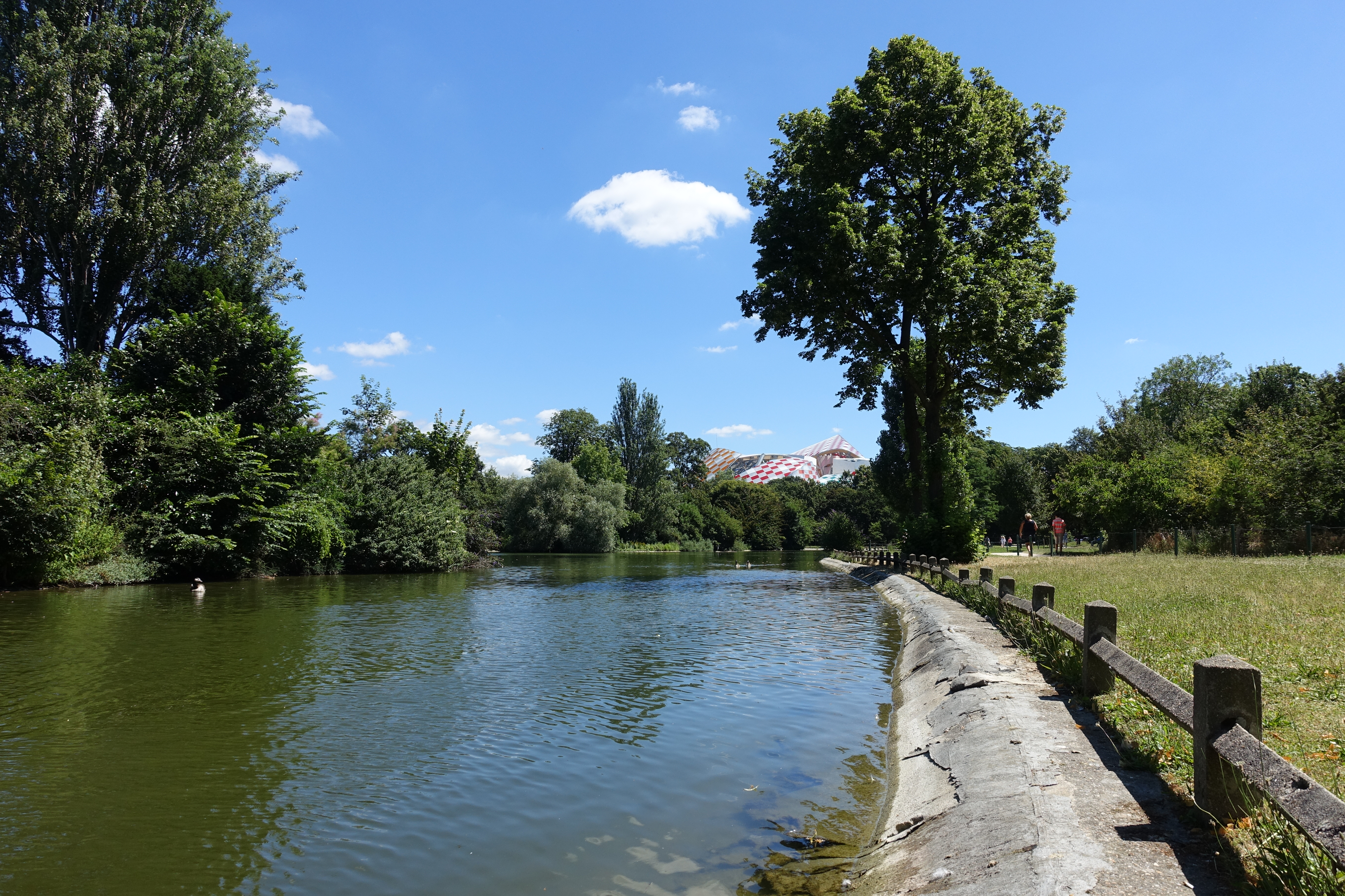 Mare Saint-James @ Bois de Boulogne @ Paris